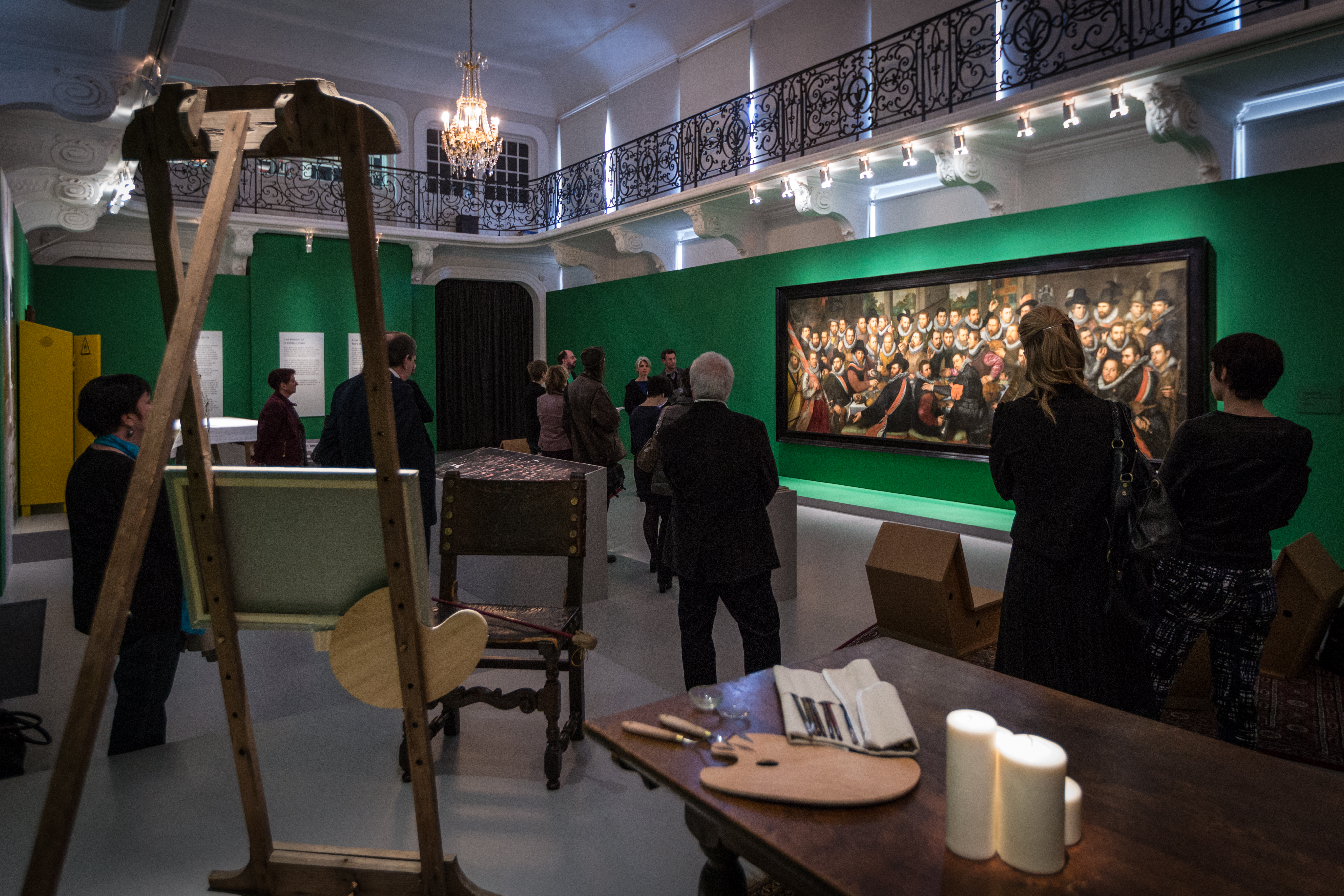 Présentation à la presse de La Garde civique de Saint-Adrien par Cornelis Engelsz 1612 après restauration. Musée des Beaux-Arts de Strasbourg, 21 mars 2014.